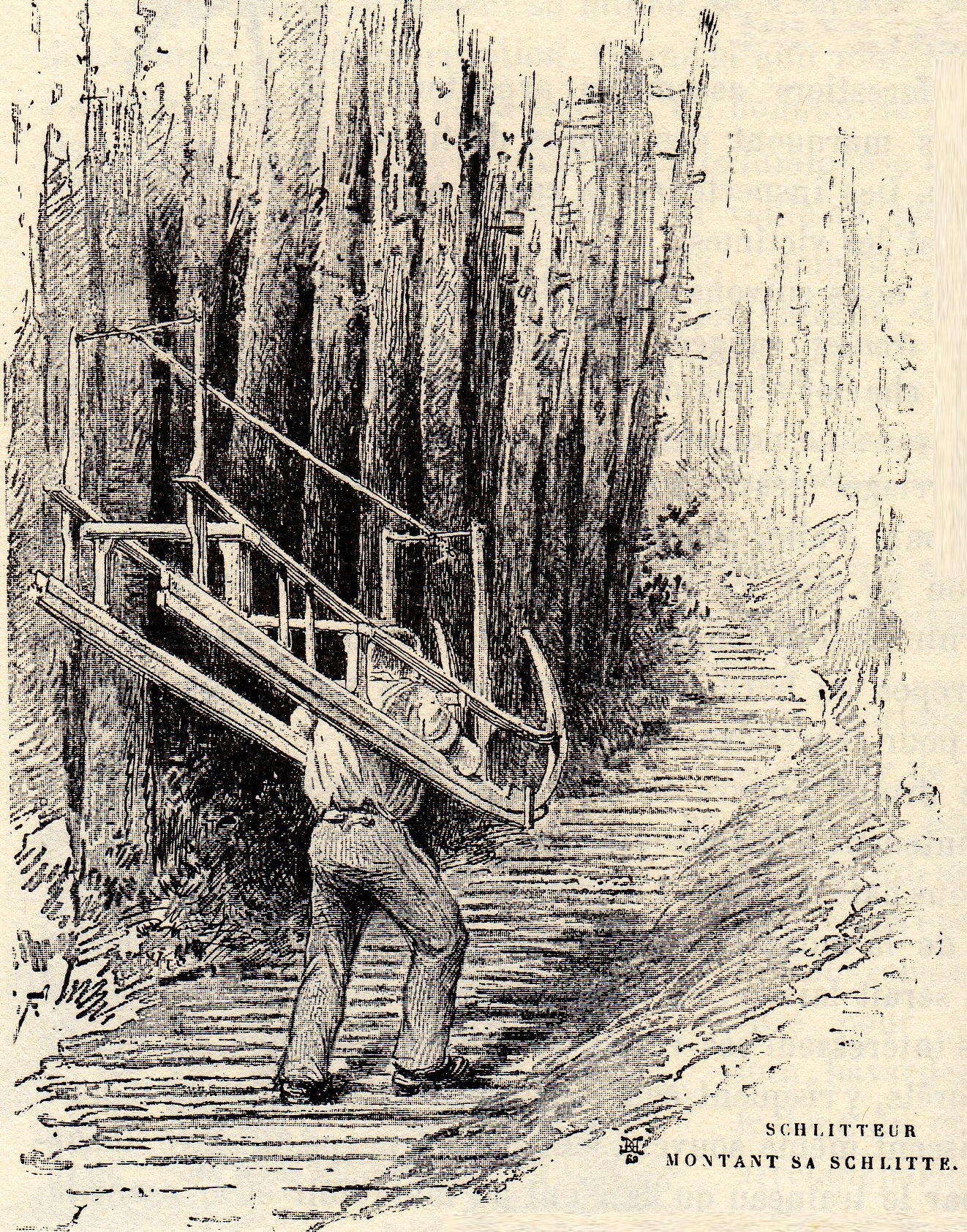 Schlitteur dans les Vosges. Dessin réalisé dans la région de Senones.